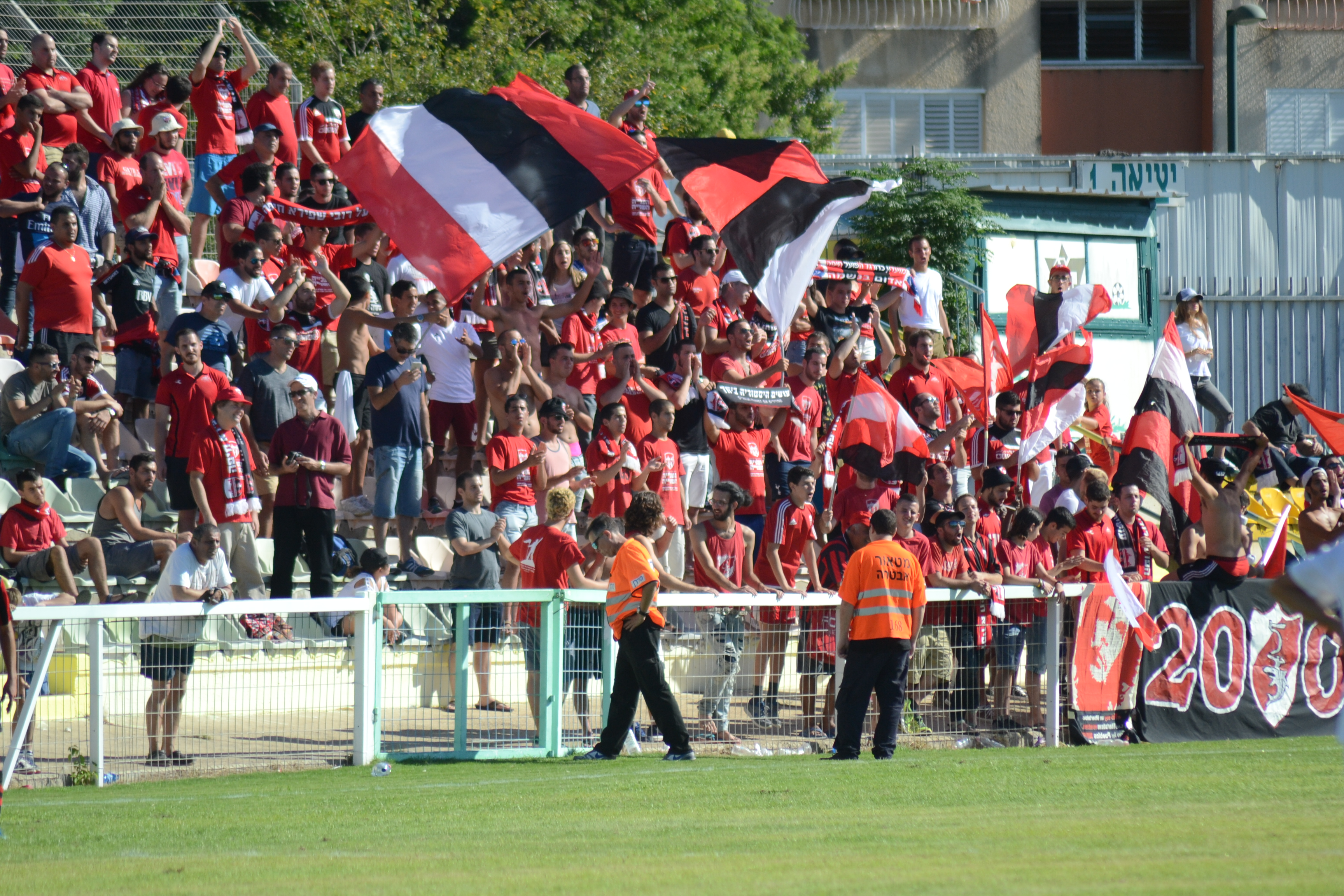 הקהל חוגג במהלך משחק בית מול הפועל הרצליה בליגה א צפון, קריית אתא 30.09.16